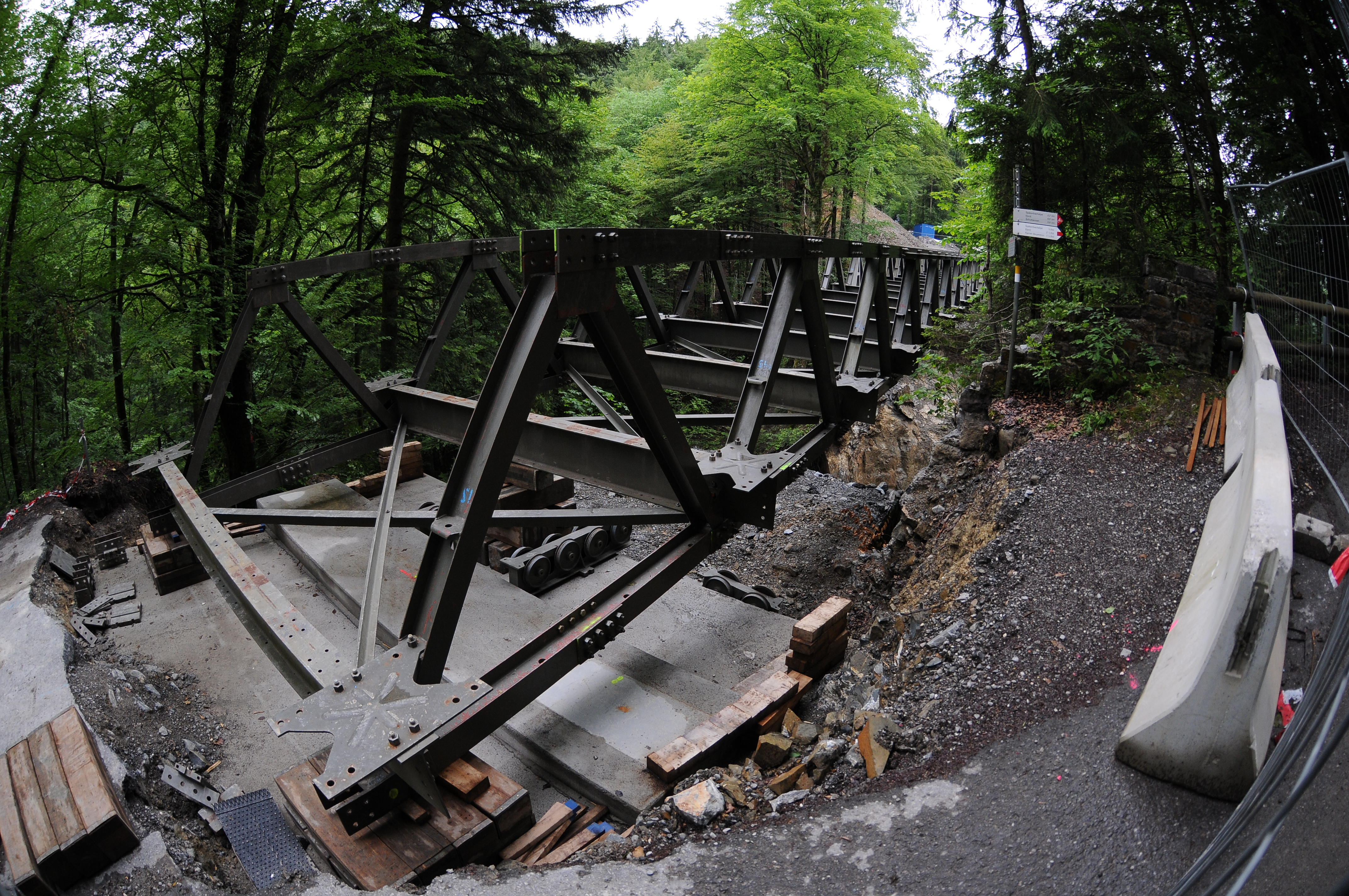 Am 10. Mai 2011 stürzt die Rappenlochbrücke infolge eines Felssturzes unter der Brückenauflage ein. Die Pionier Kompanie (gebbwgl)/PiB2 des Österreichischen Bundesheeres errichtet mit ca. 70 Pionieren und Offizieren hier eine Krupp-D-Brücke.